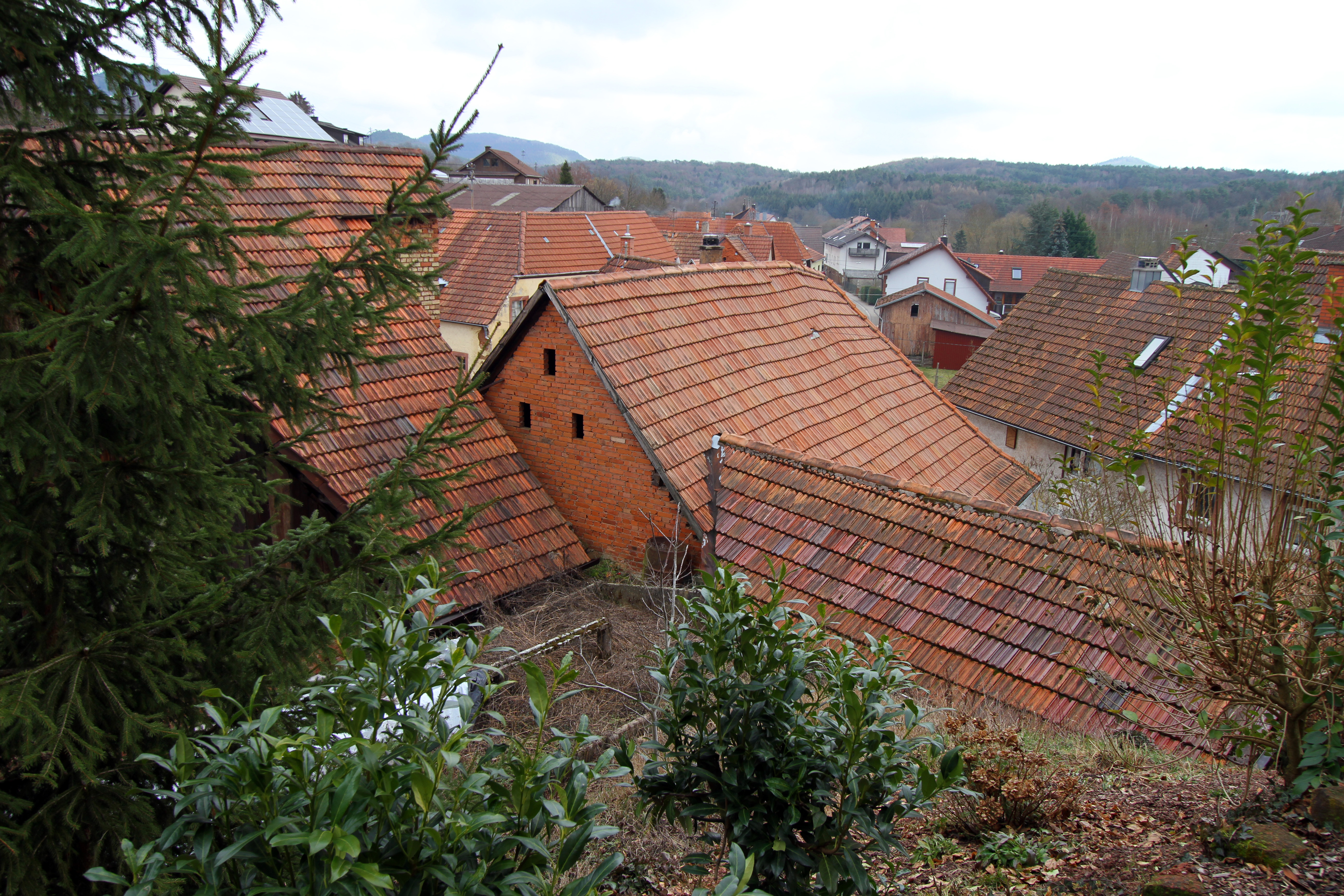 Völkersweiler